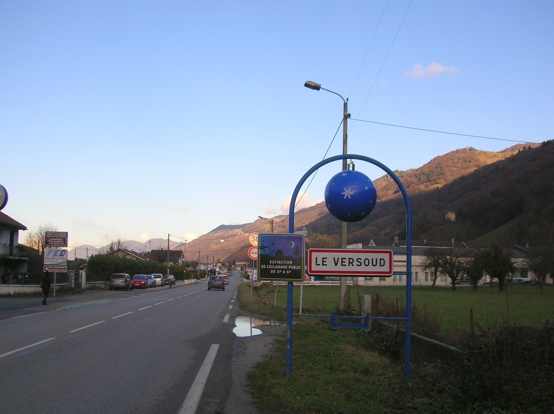 panneaux à l'entrée du village (Extinction de l'eclairage public de 0h à 5h). Le Versoud, Isère, Rhône-Alpes, France.